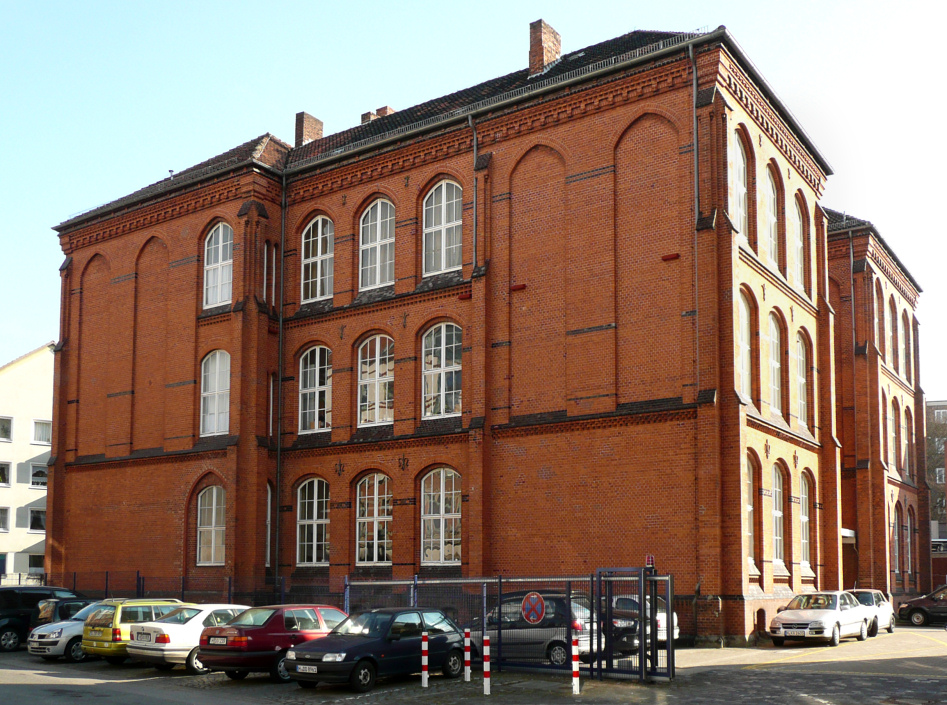 Hannover, Kanonenwall 19